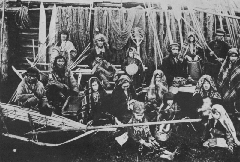 Ostjaken vom Ob.